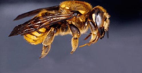 Trachusa zebratum